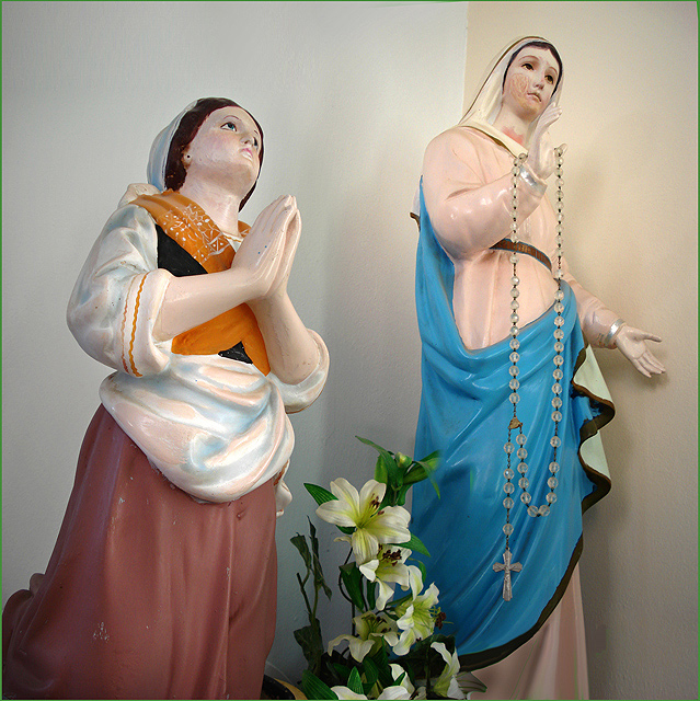 Nossa Senhora de Caravaggio, no interior da Capela de Santo Antônio da Linha 80, interior de Flores da Cunha, Rio Grande do Sul, Brasil.